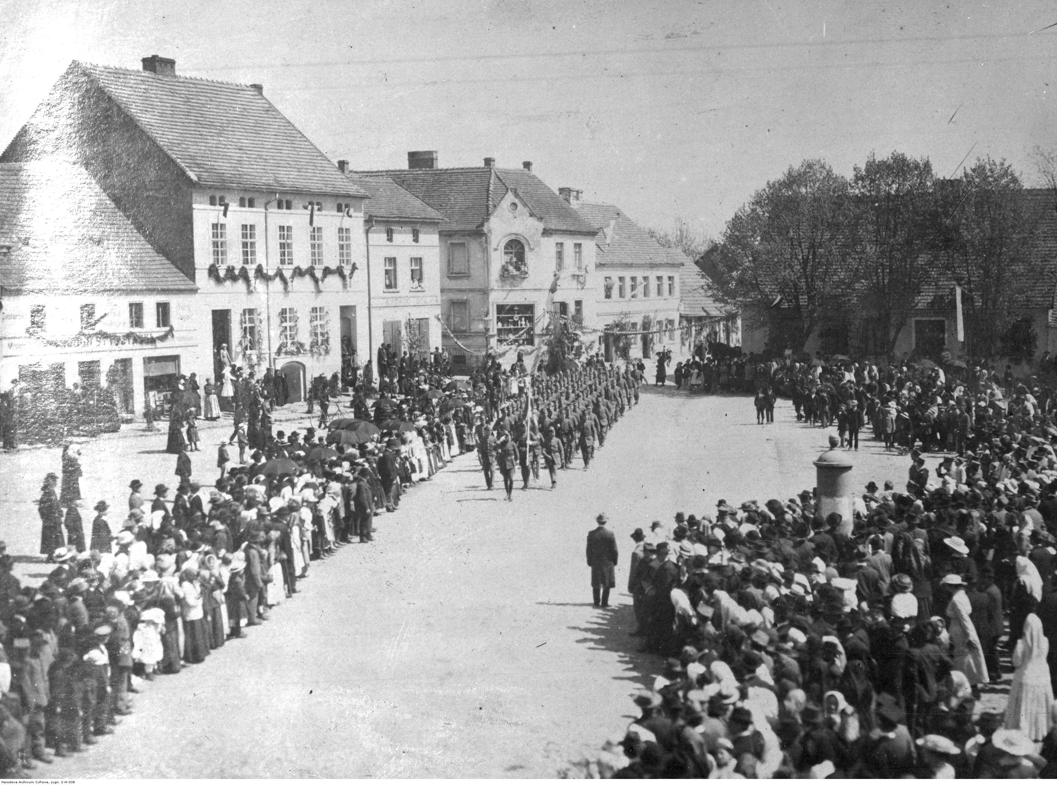 Uroczystość wręczenia sztandaru 2 Eskadrze Wielkopolskiej w Nowym Mieście nad Wartą 5 maja 1919. Przemarsz defilady wojskowej przez rynek z ulicy Żerkowskiej w kierunku zachodnim w otoczeniu zgromadzonych ludzi. Koncern Ilustrowany Kurier Codzienny - Archiwum Ilustracji. Sygnatura: 1-H-338